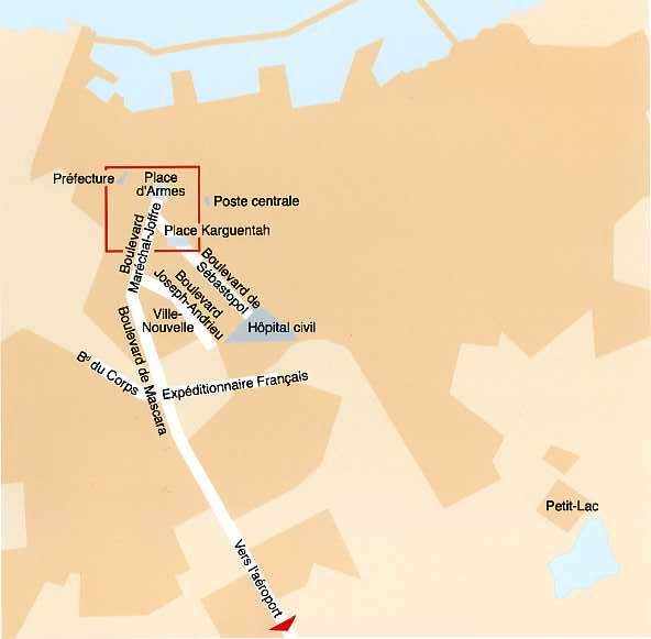 Plan très sommaire d'Oran avec seulement quelques lieux indiqués